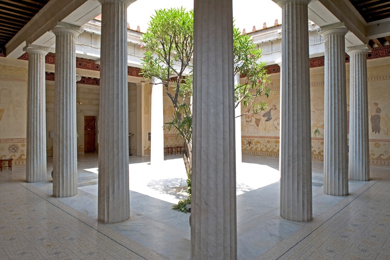 Le patio de la Villa Kerylos.